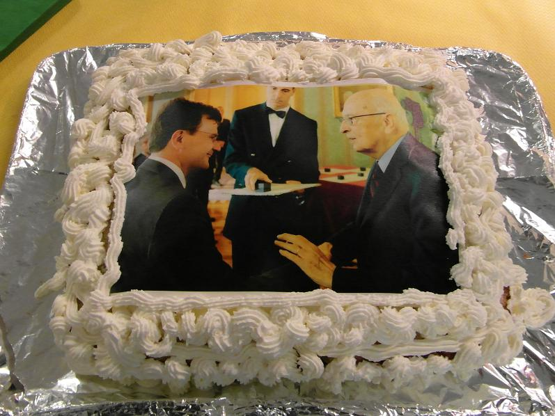 Commemorazione della consegna dell'onorificenza di Commendatore a Oscar Adriani